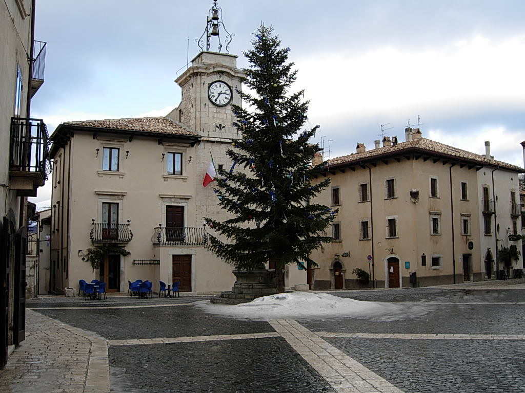 Piazza Municipio a Pescocostanzo (AQ) Foto personale